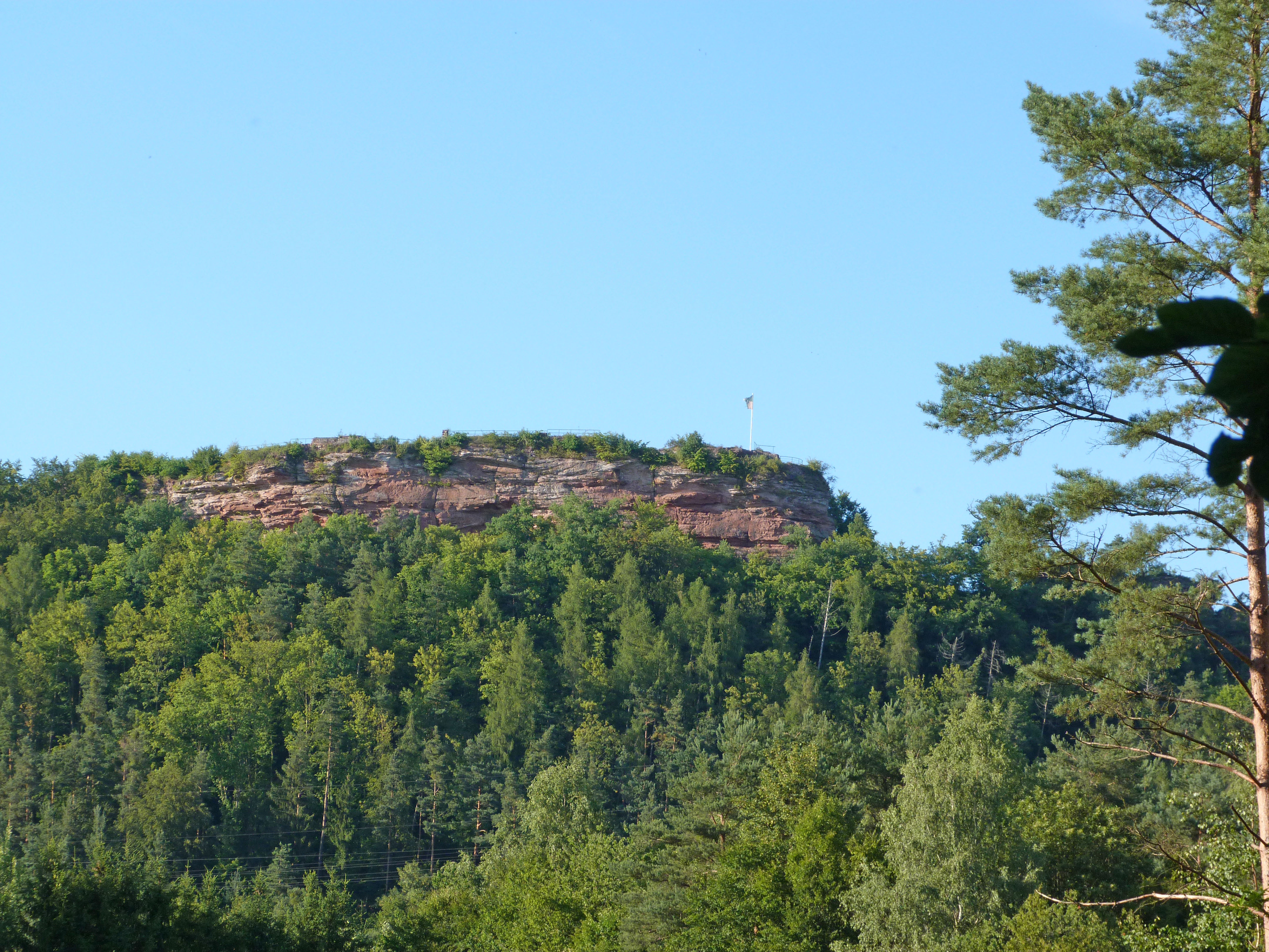 Falkenburg bei Wilgartswiesen von Südwesten, fotografiert am 11.07.2011